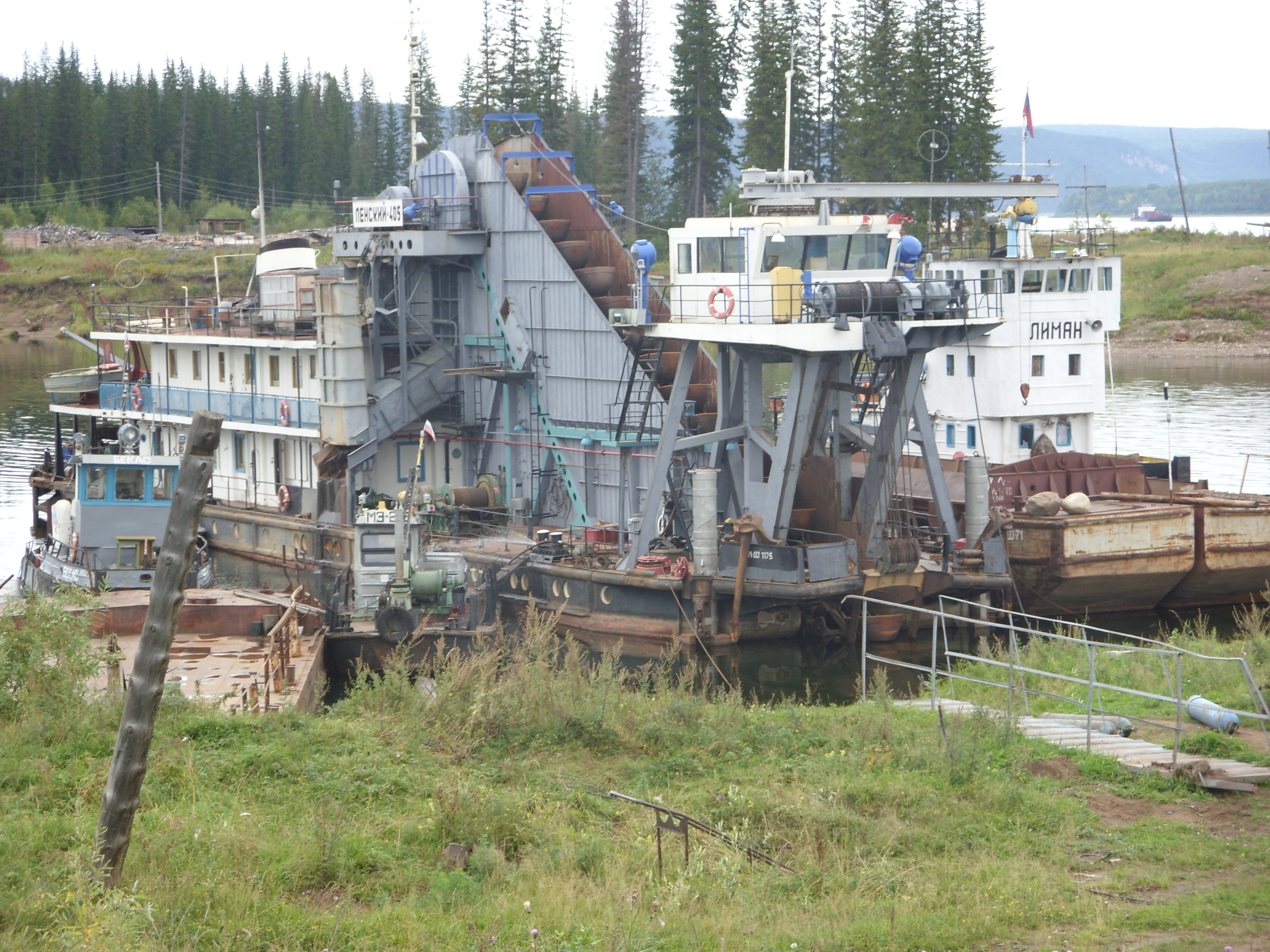 Затон ВРВП